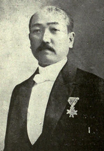 森宗作 もりそうさく